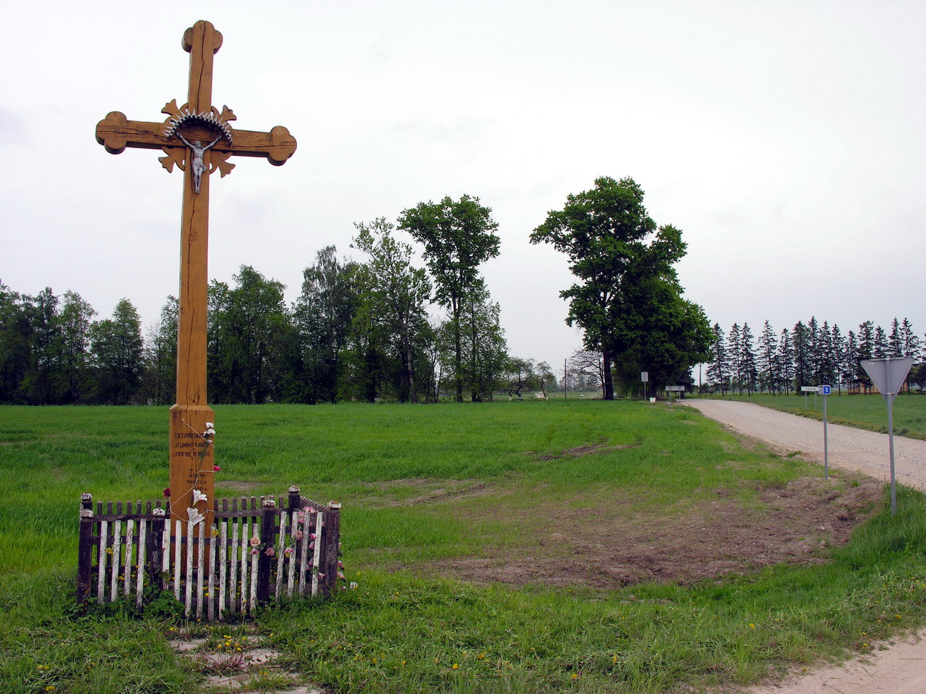 Šašiai 2009 m. gegužės 17 d.